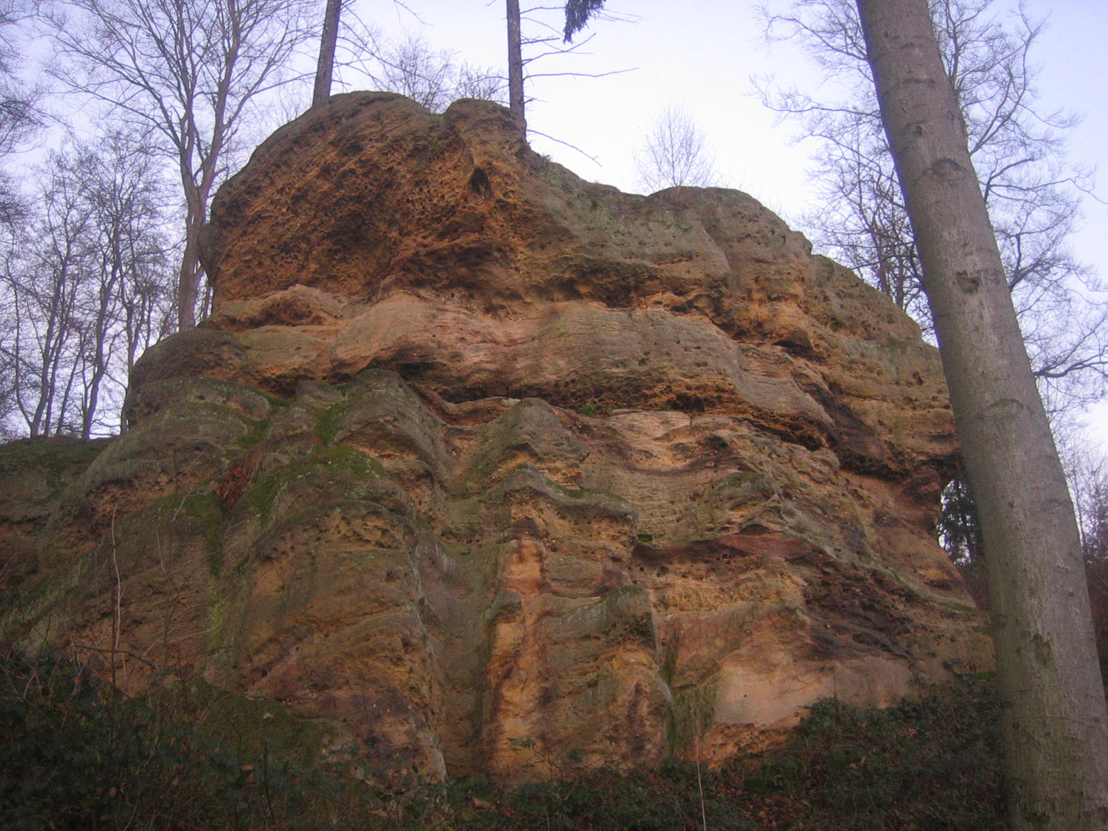 Riesenstein von Helmarshausen